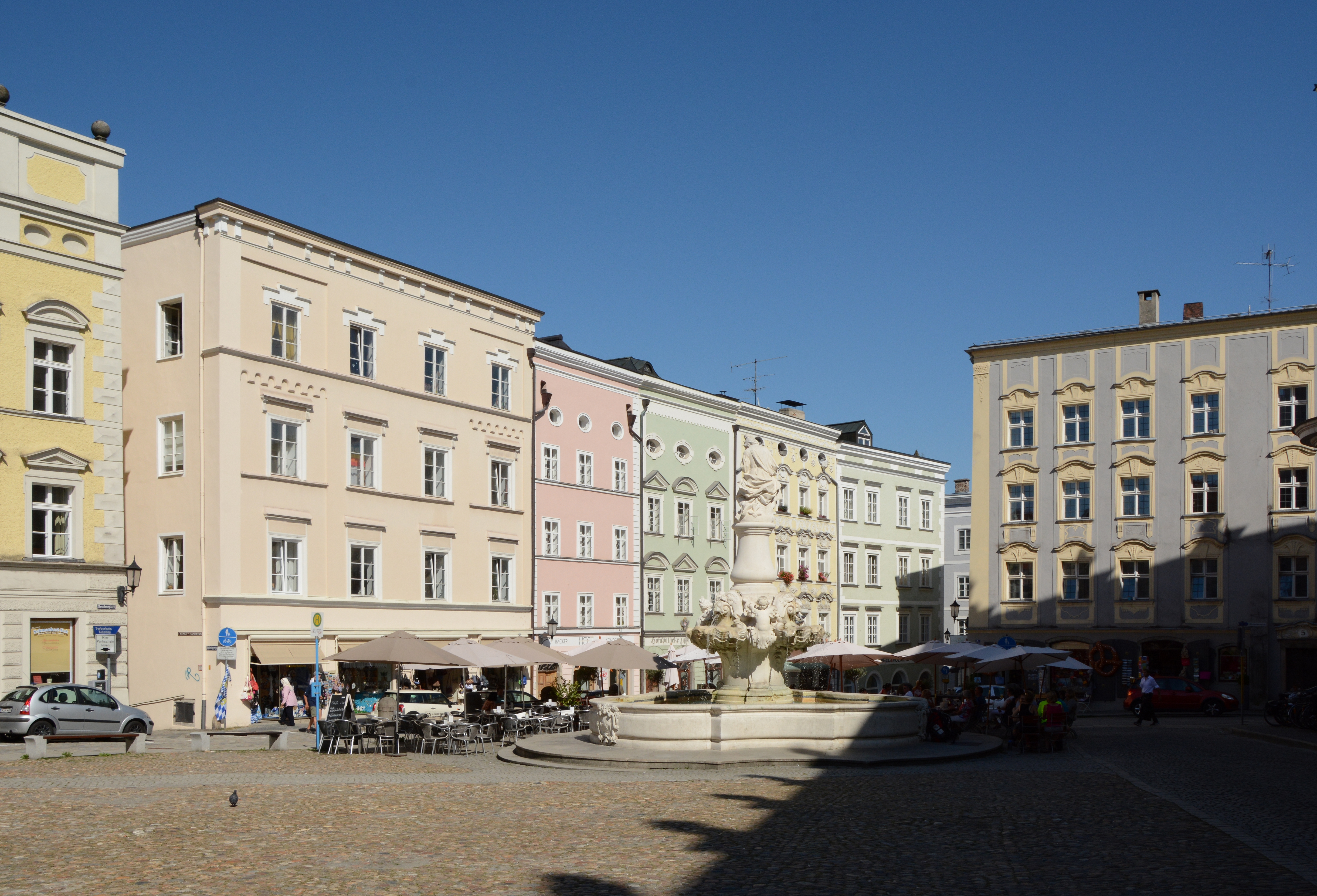 Der denkmalgeschützte Wittelsbacherbrunnen am Residenzplatz in Passau.